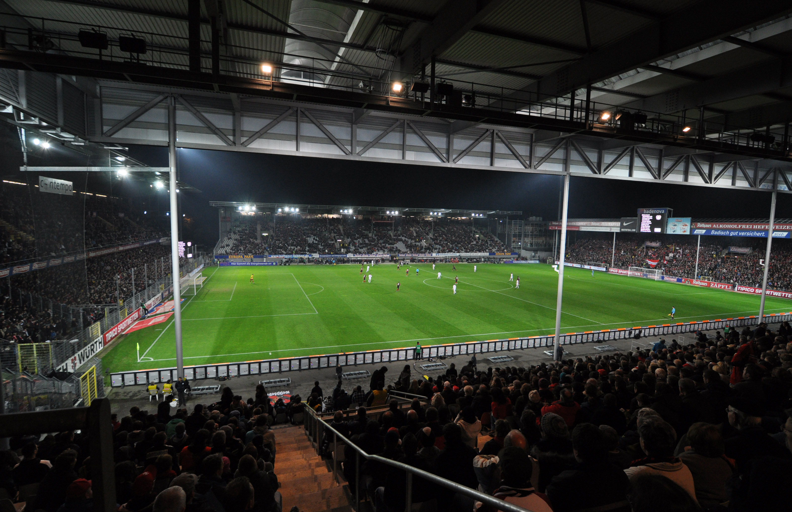 Badenova-Stadion, Freiburg (Panorama); SC Freiburg - Bayer Leverkusen 0:1; 28. Oktober 2011